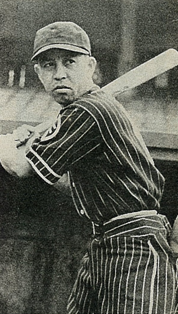 山田伝（阪急軍、1941年）